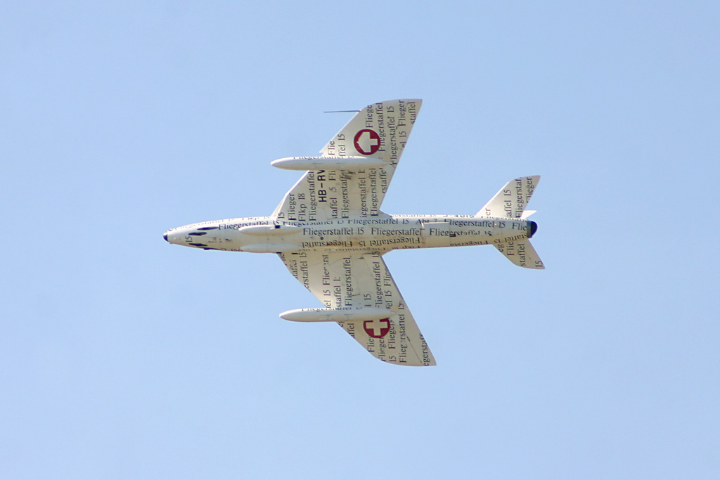 Hawker Hunter F.58, J-4040 PAPYRUS, Air 04, Payerne, Switzerland